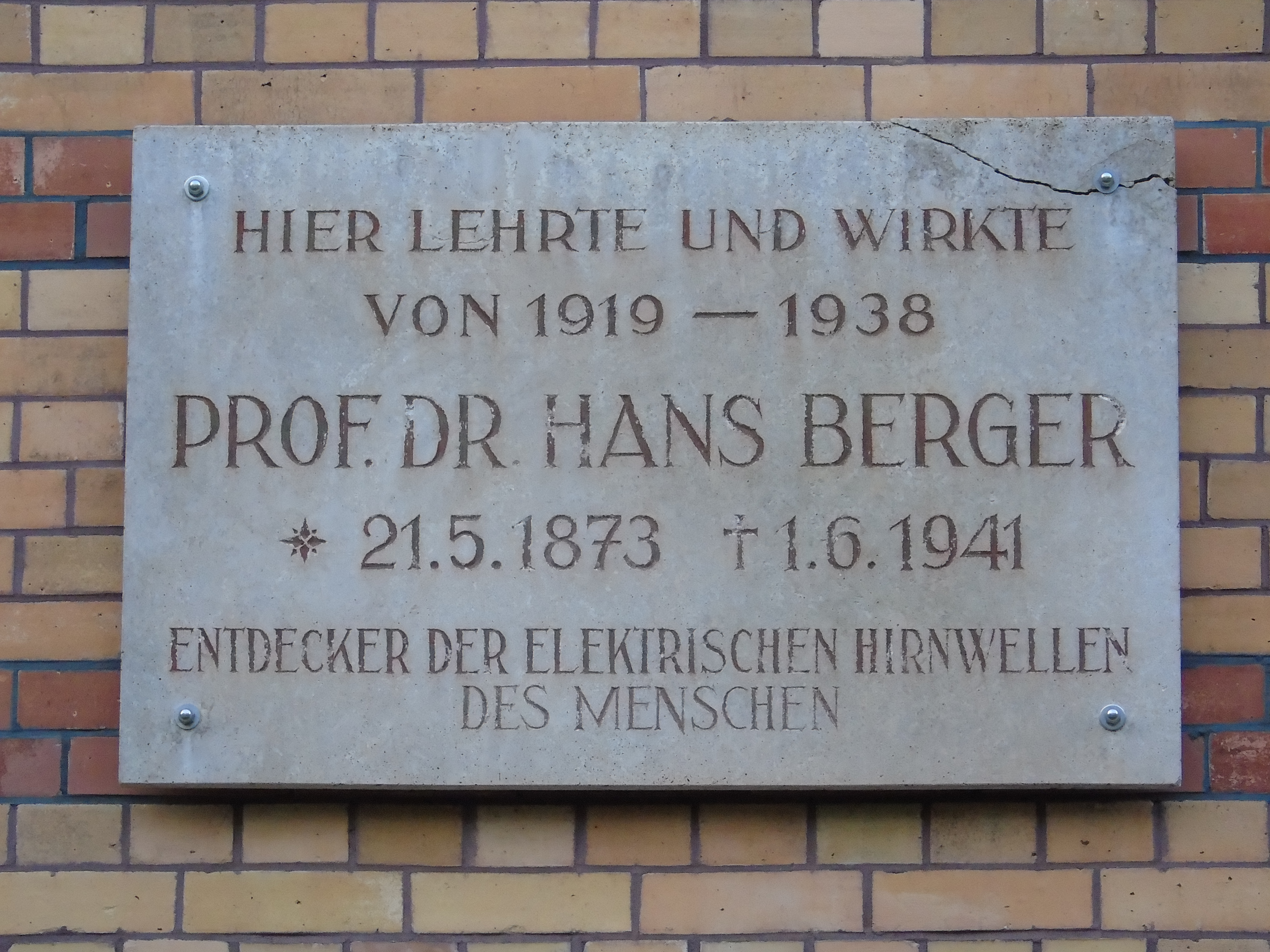 Gedenktafel Hans Berger (Neurologe) an der Universität Jena